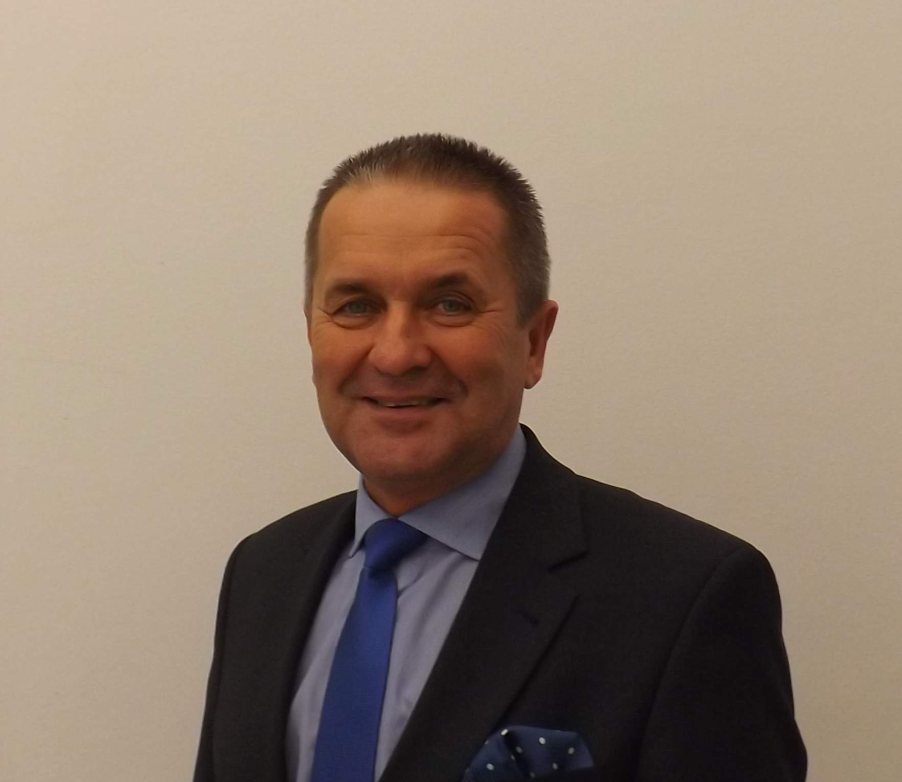 Jerzy Borkowski, poseł Twojego Ruchu.